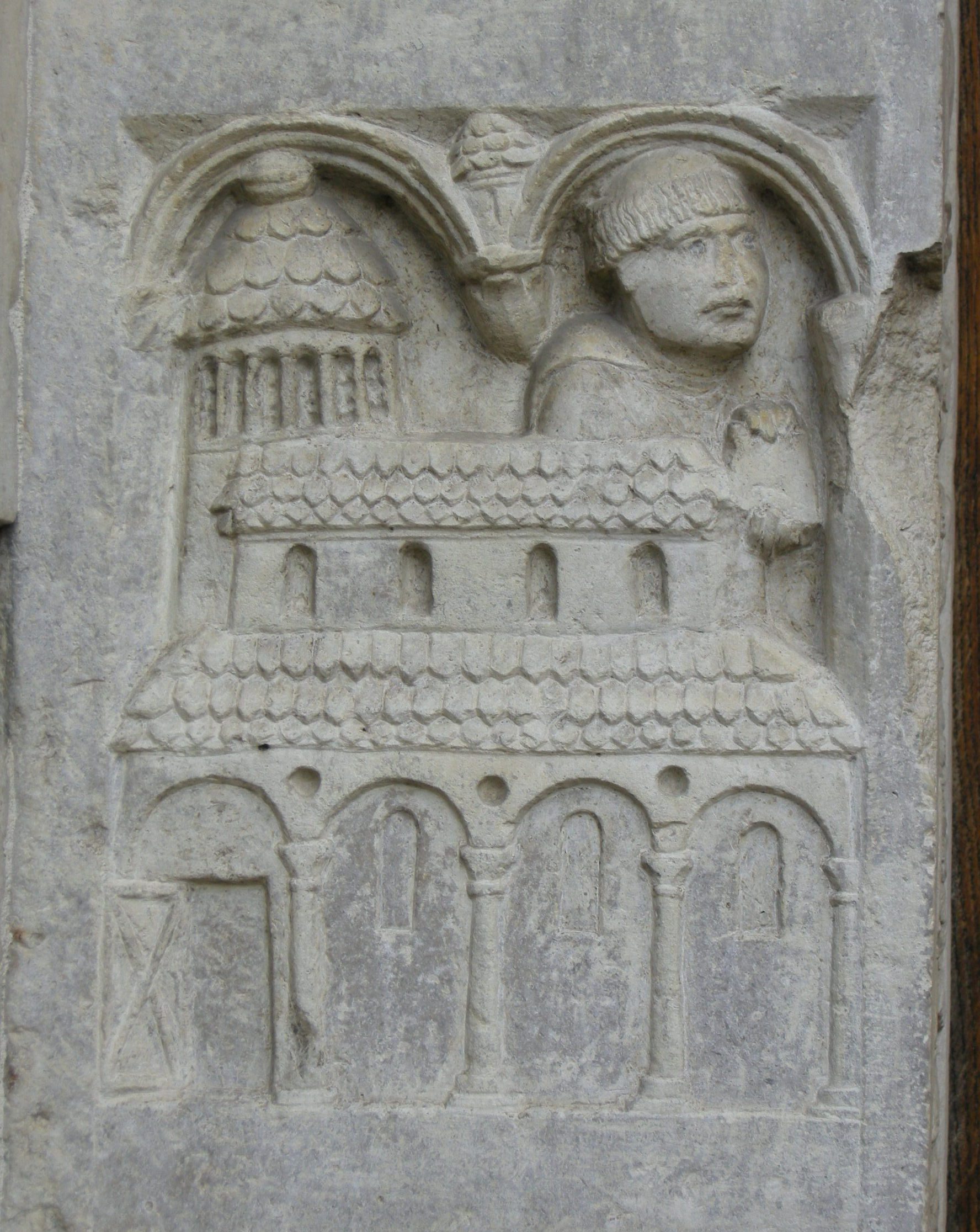 Abbazia di nonantola, portale di seguaci wiligelmo, stipite sx, formella 04 anselmo, fatto monaco, fonda nonantola